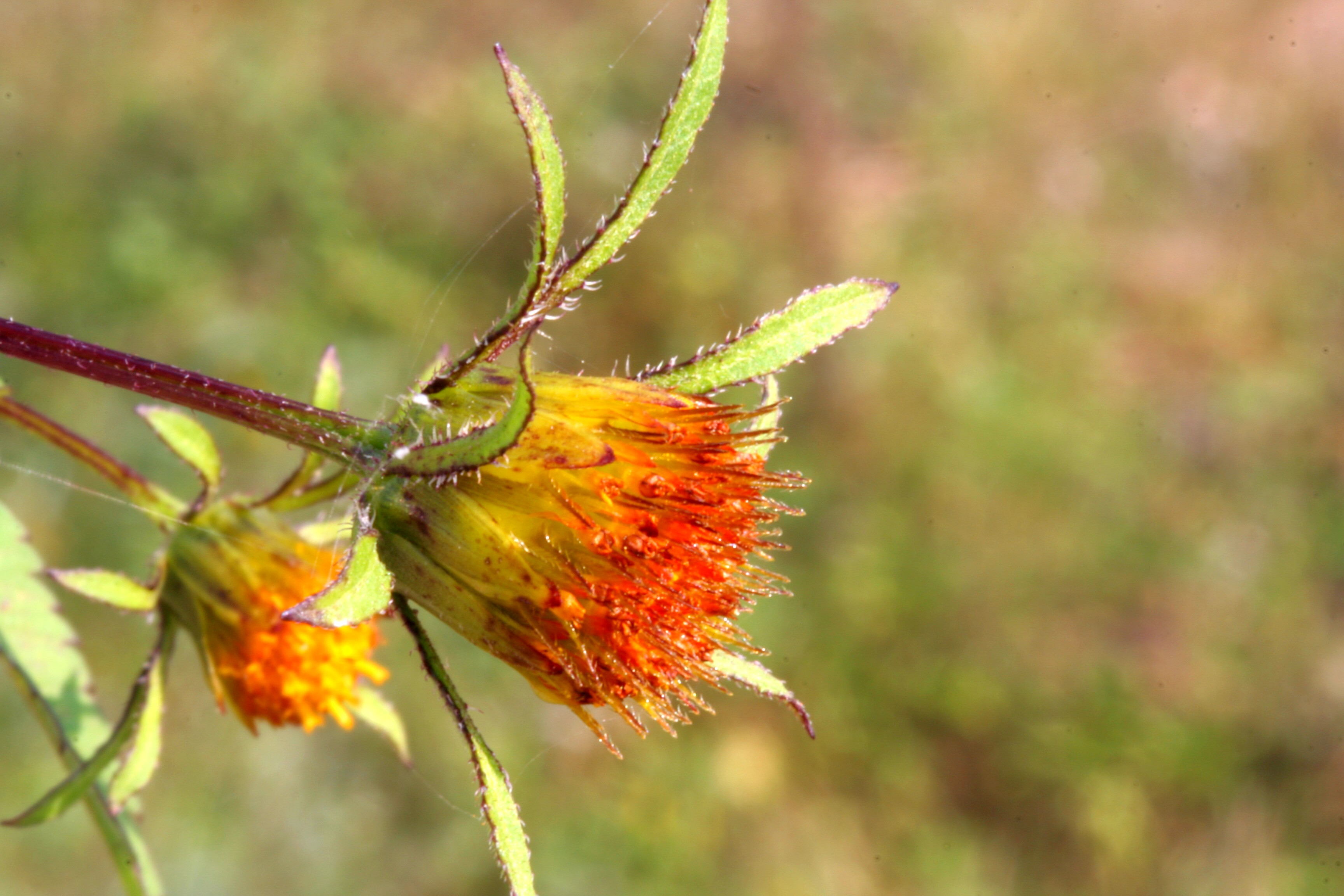 Forbicina peduncolata - Località: Praloran, Limana (BL), 319 m s.l.m.